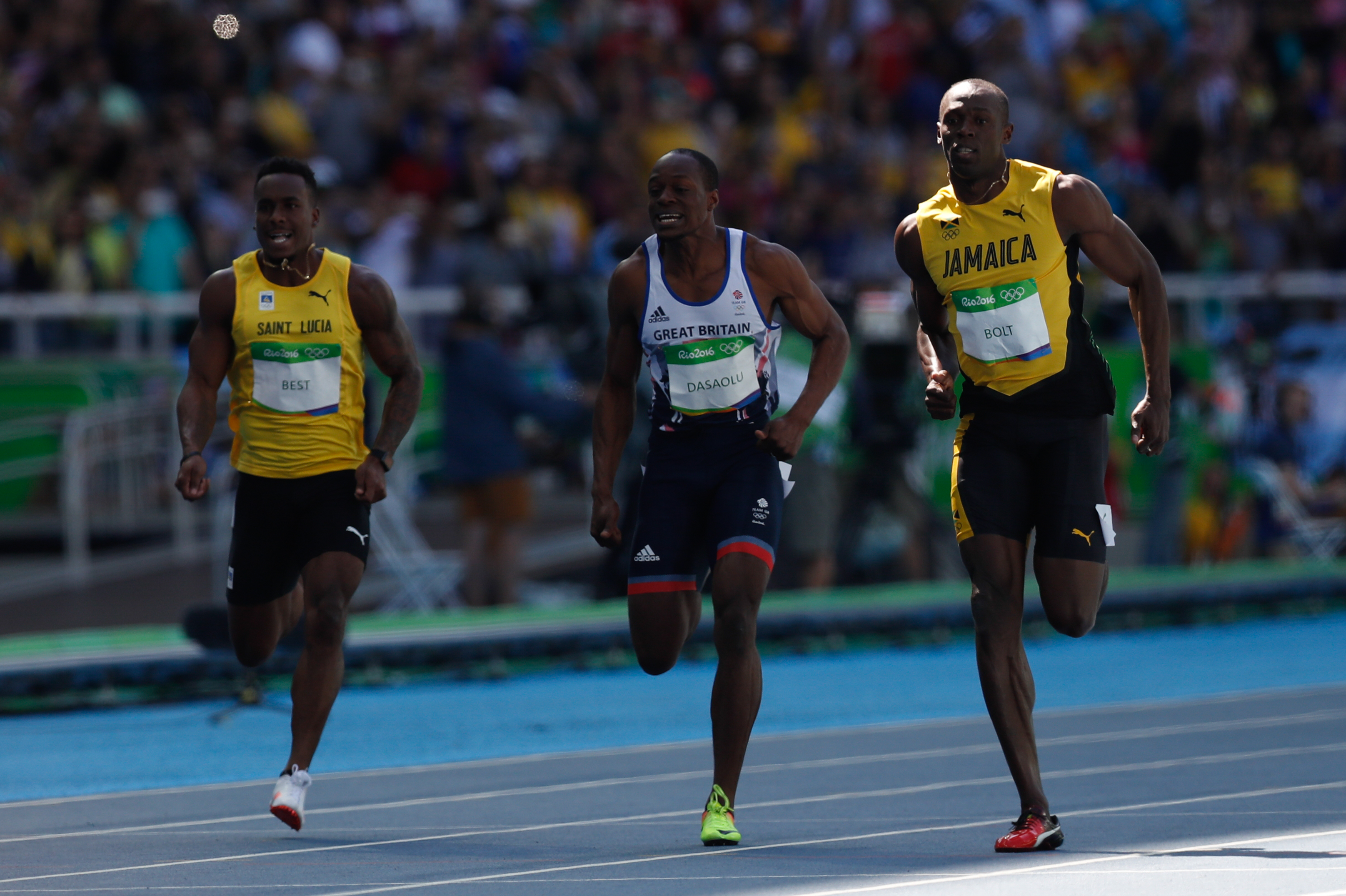 Men's 100 m sprint heats